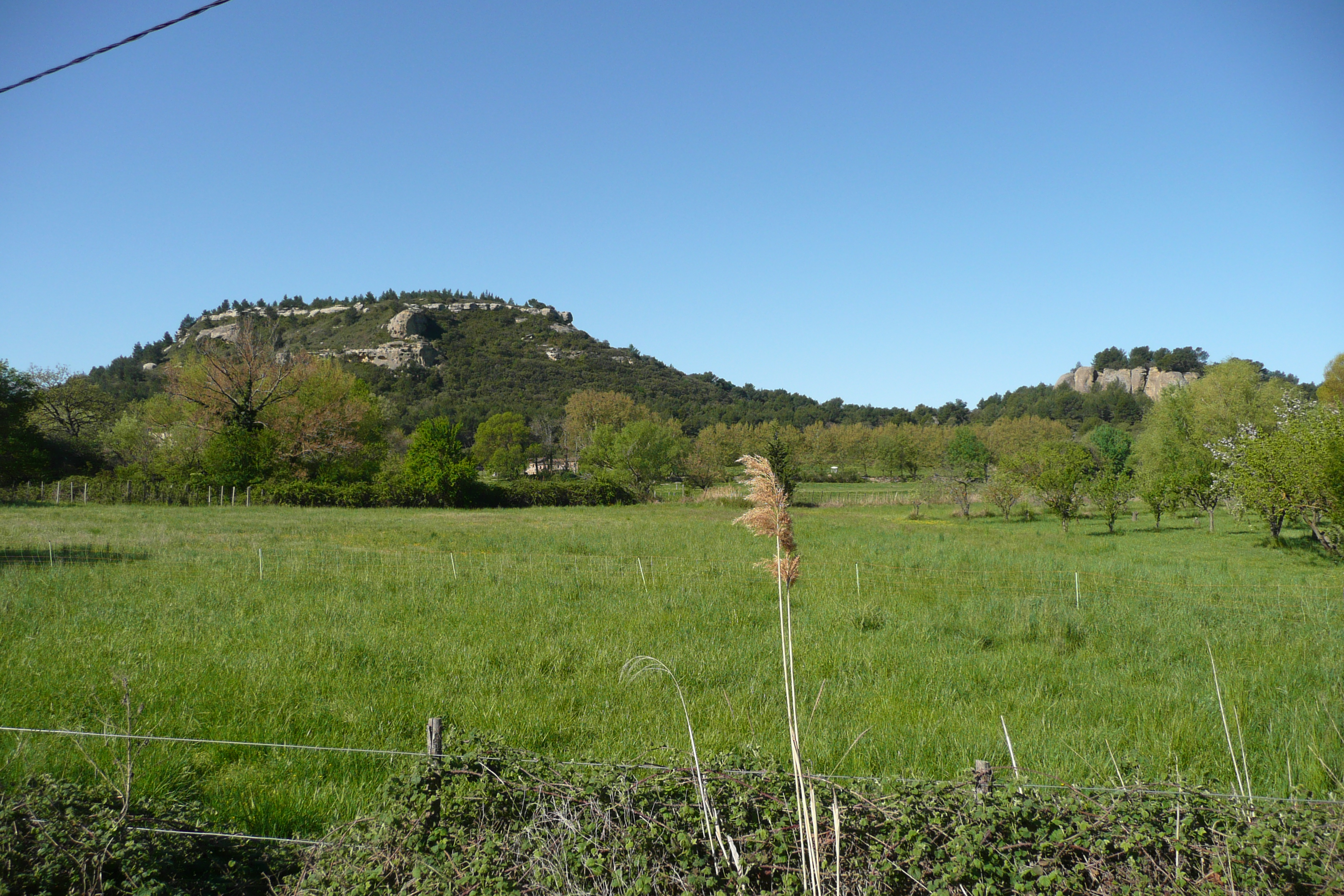 Paysage à Lamanon.